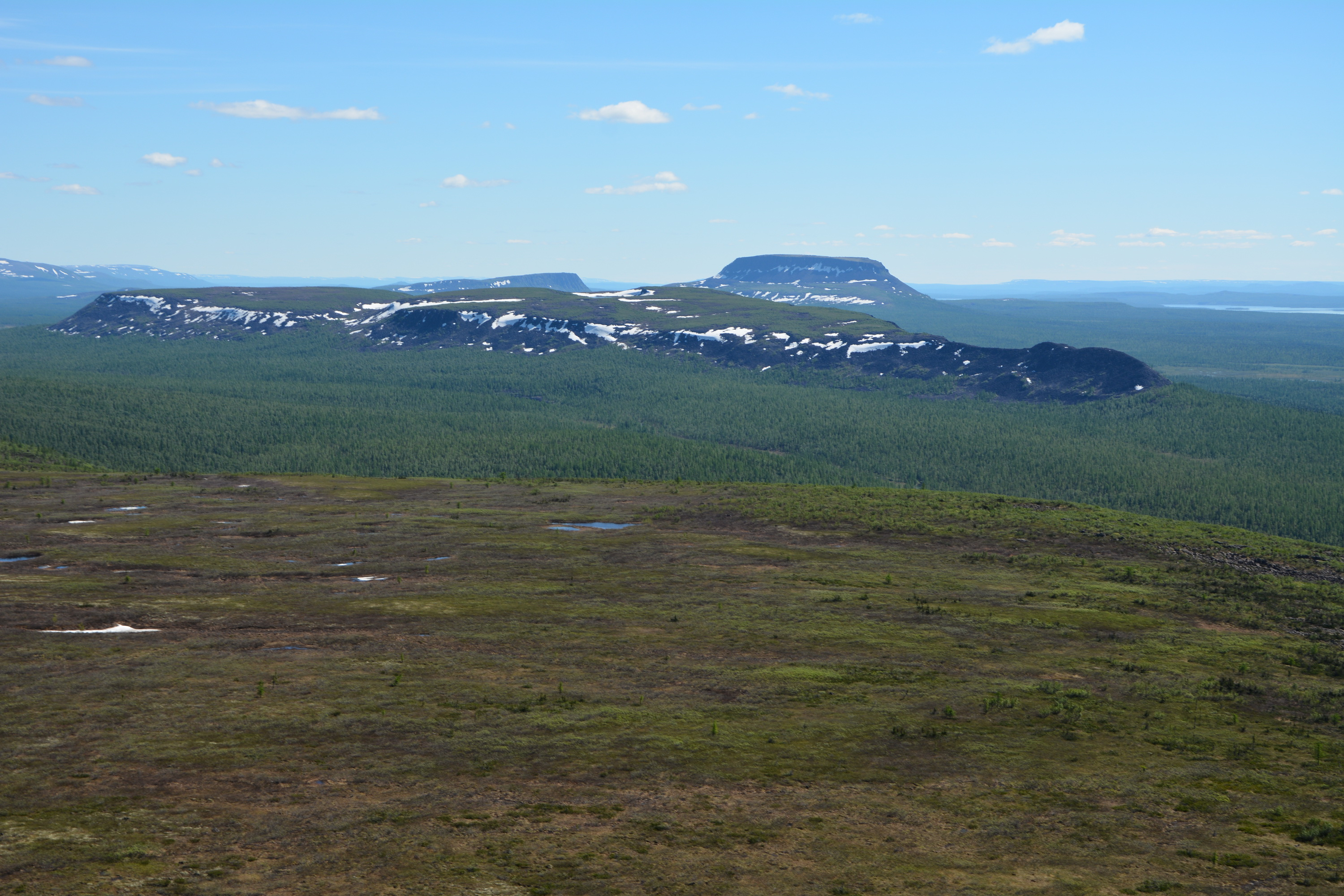 г. Озерная